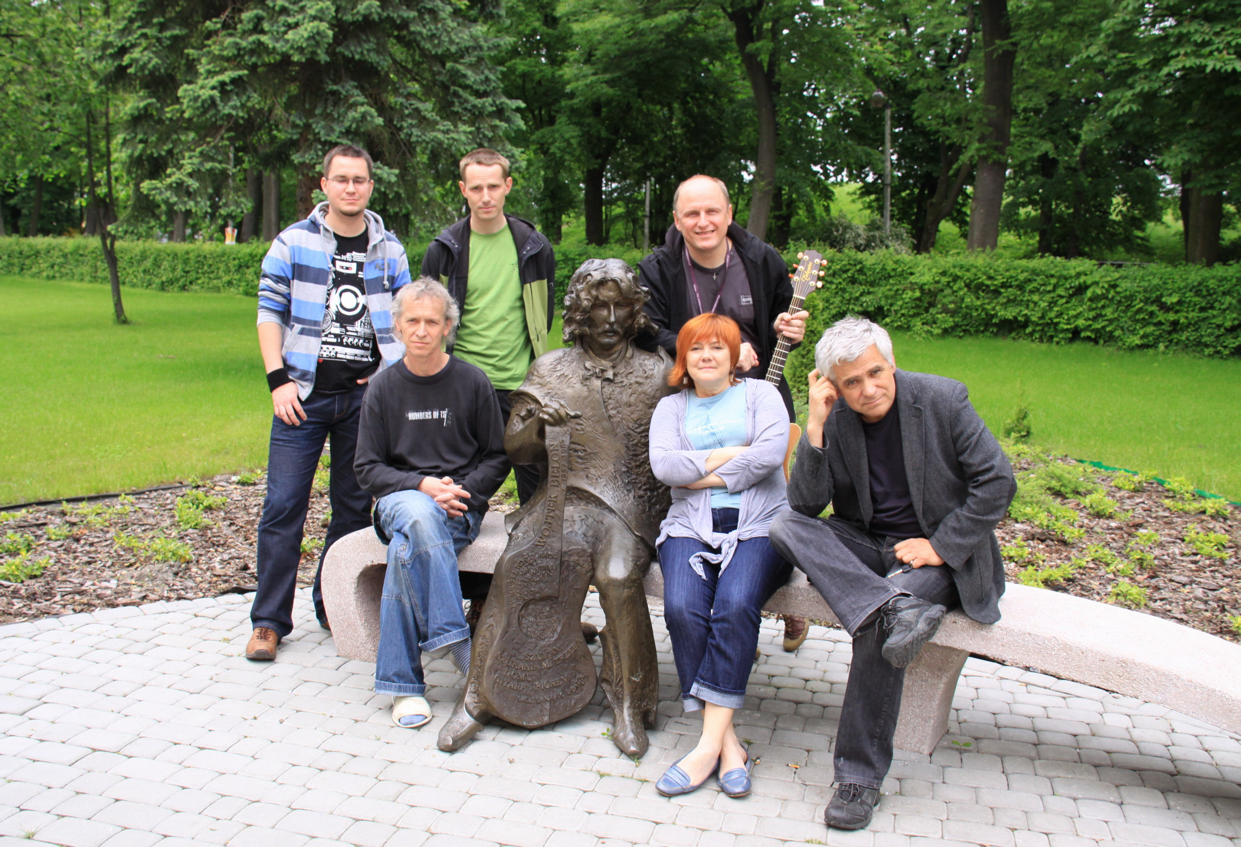 Artyści z Wolnej Grupy Bukowina na Ławeczce Wojtka Belona w Busku-Zdroju. Na zdjęciu, od lewej, siedzą: Wojciech Jarociński, Elżbieta Kulawik, Wacław Juszczyszyn, stoją: Wojciech Maziakowski, Marek Zarankiewicz, Krzysztof Żesławski).